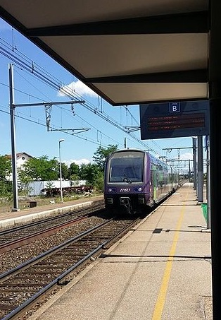 TER entre en Gare de Saint-Priest